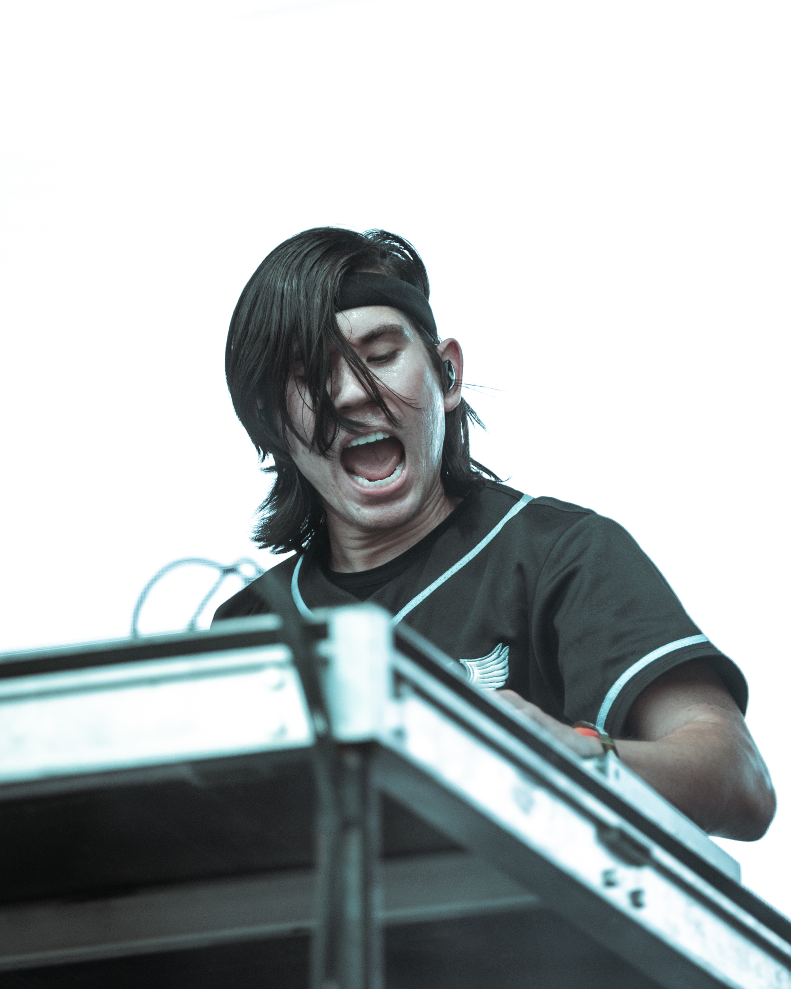 Griffyn